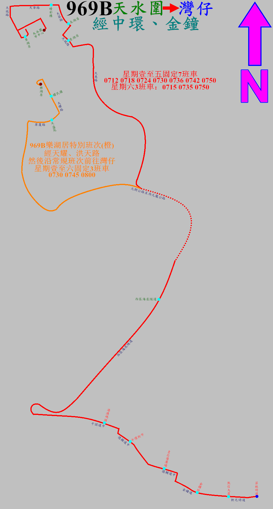 中文（香港）: 過海隧巴969B線港島方向的走線圖